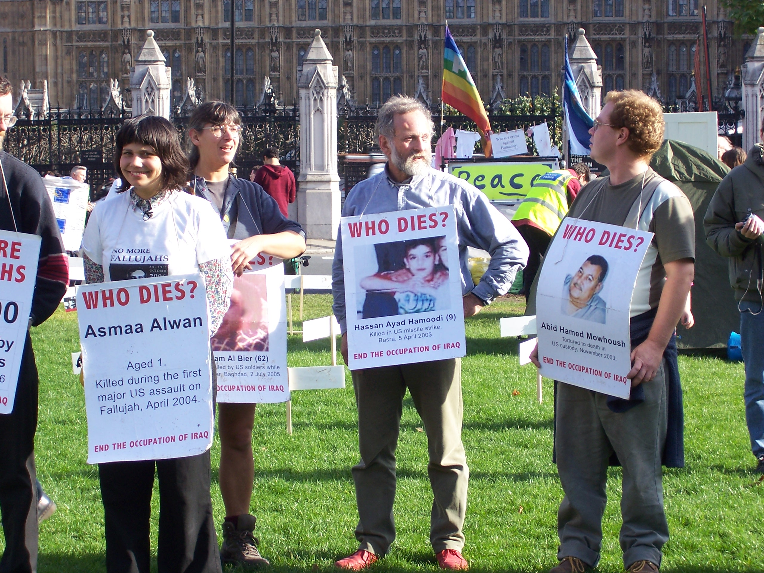 Manifestations devant le parlement anglais - novembre 2006